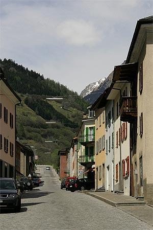 Dorfstrasse in Mesocco